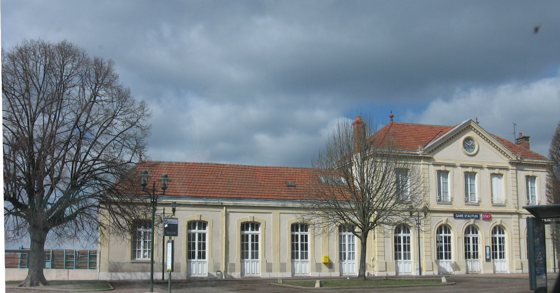 train station Autun